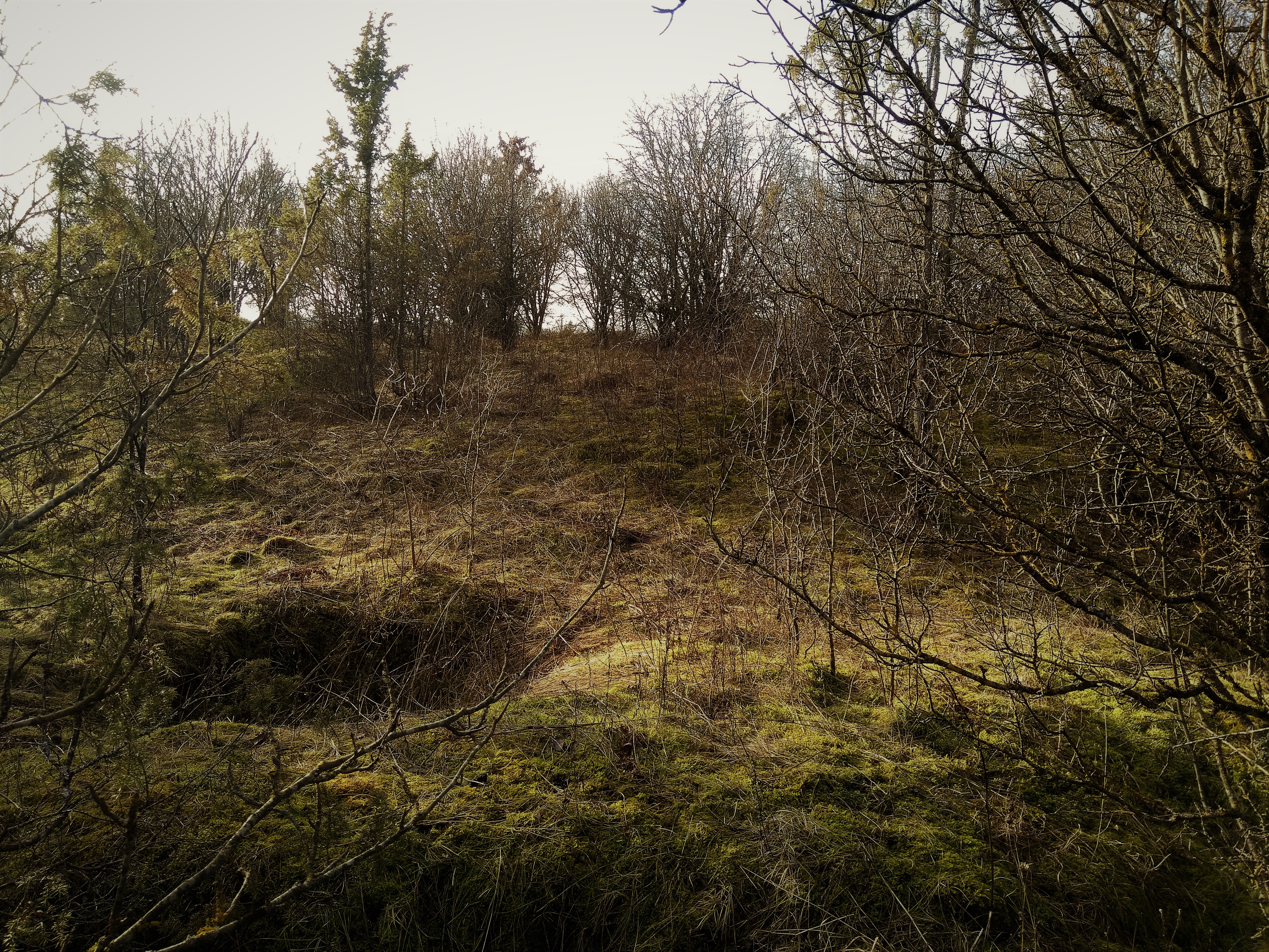 Vaade idast linnuse sisehoovi alale.